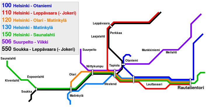 Description